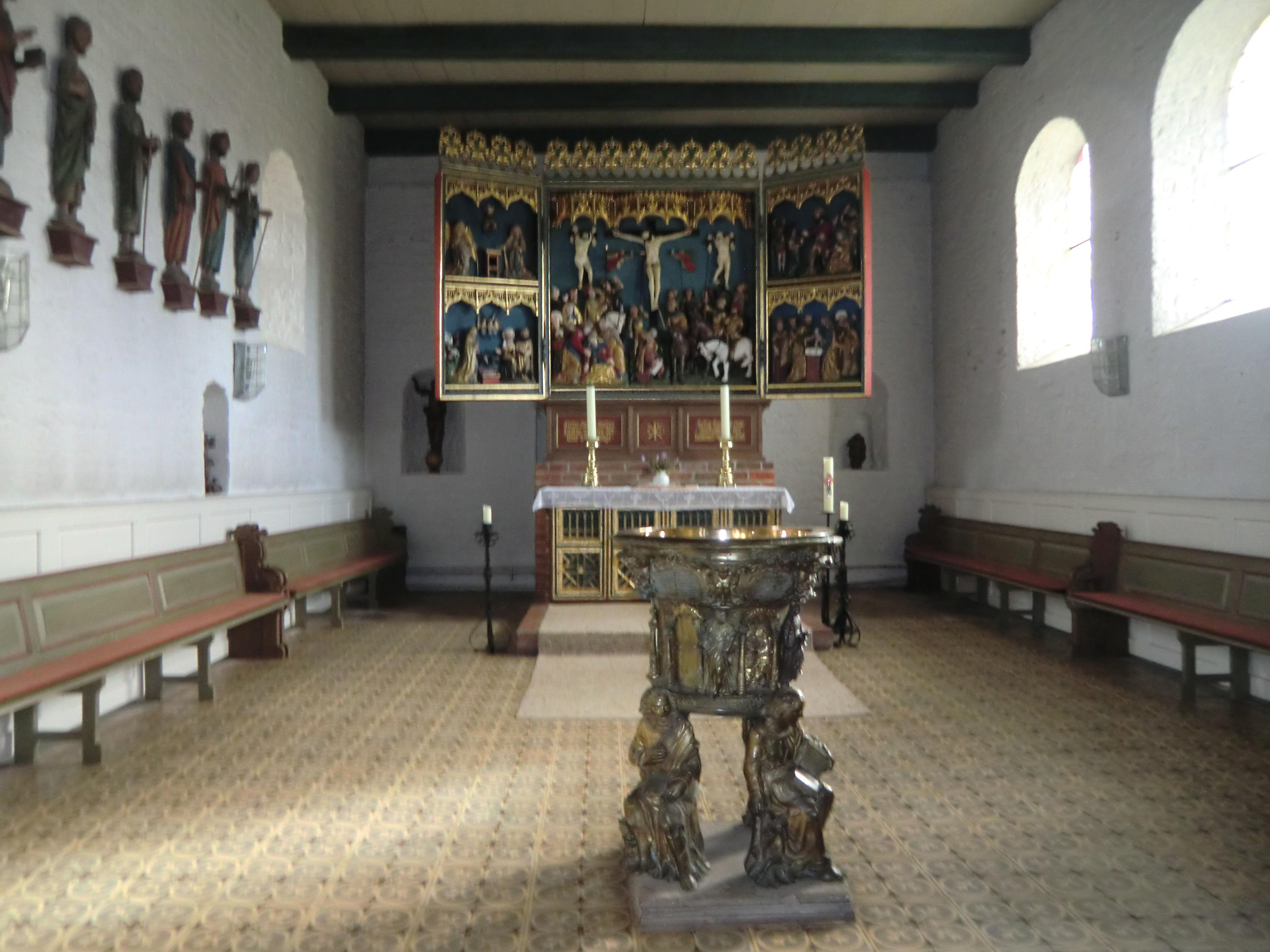 Taufbecken